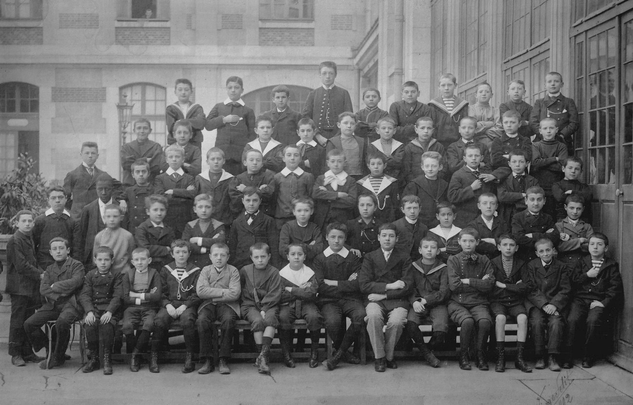 Photo d'une classe du lycée Janson de Sailly (Paris). Dimensions de l'original 30 x 40 cm, signature manuscrite et date en bas à droite.